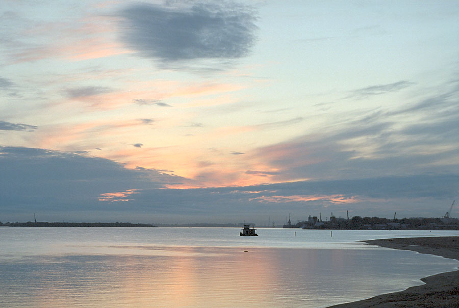 Severnaya Dvina River in Arkhangelsk, Russia